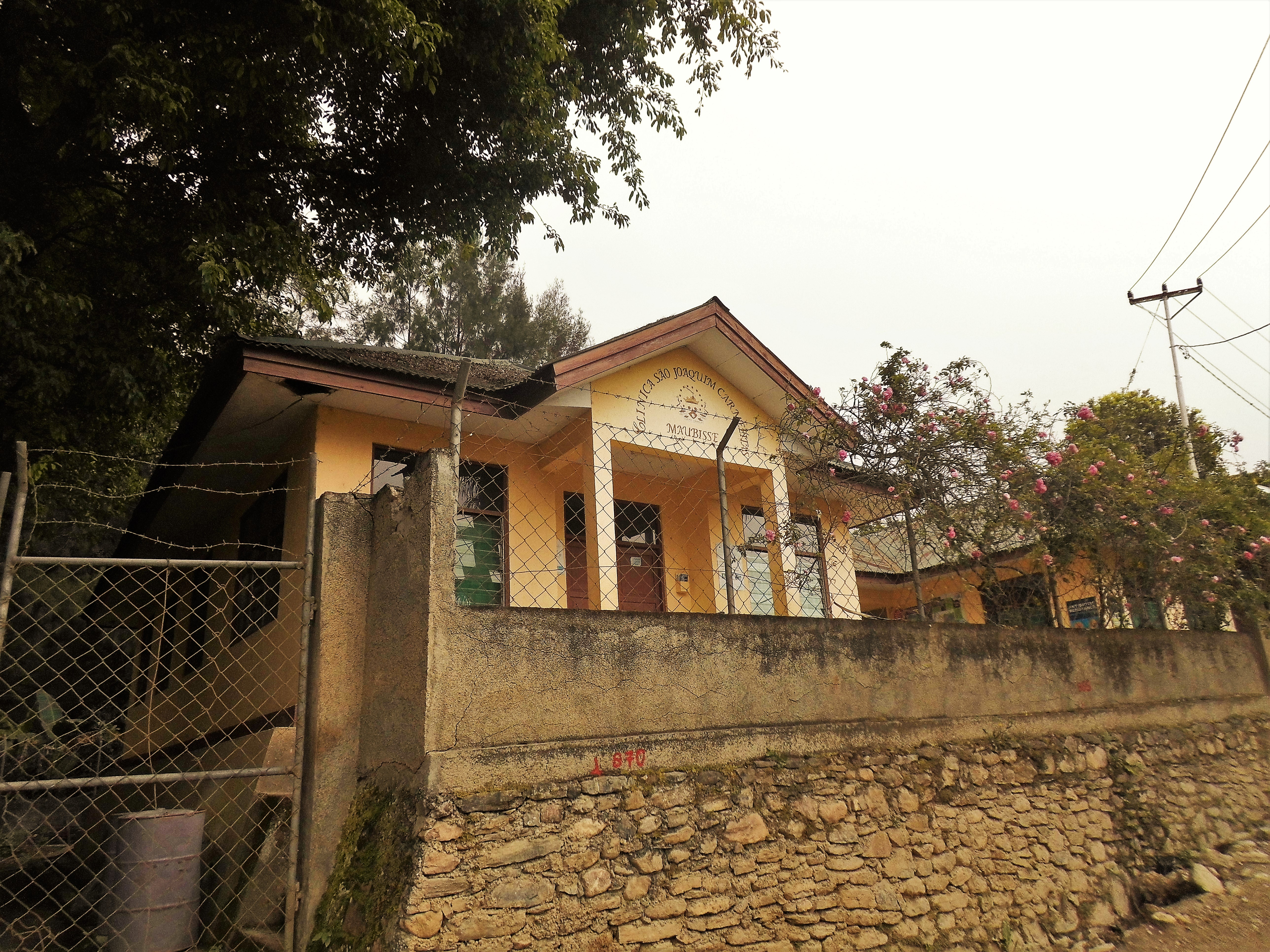 Clinica Sao Joaquim Carmelitas Maubisse